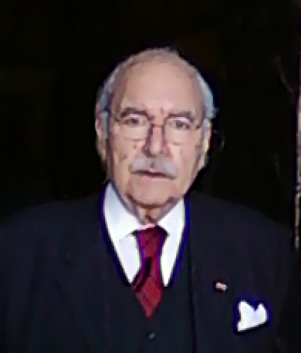 Foued Mbazzaa sortant du bureau de la présidence da la Chambre des Députés comme Président de la République Tunisienne par intérim le 15 janvier 2011 après le serment.